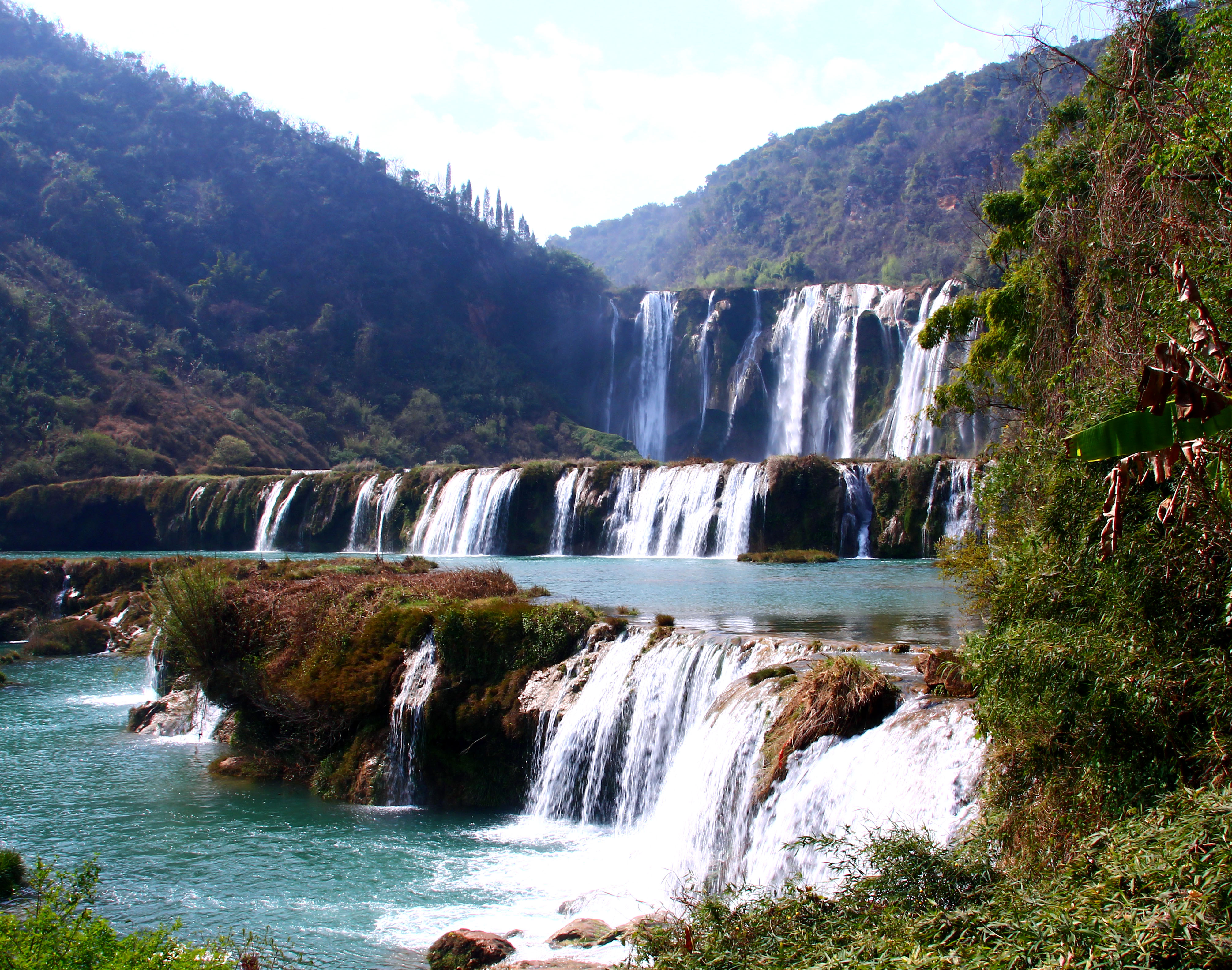 中国云南省罗平县九龙瀑布群。